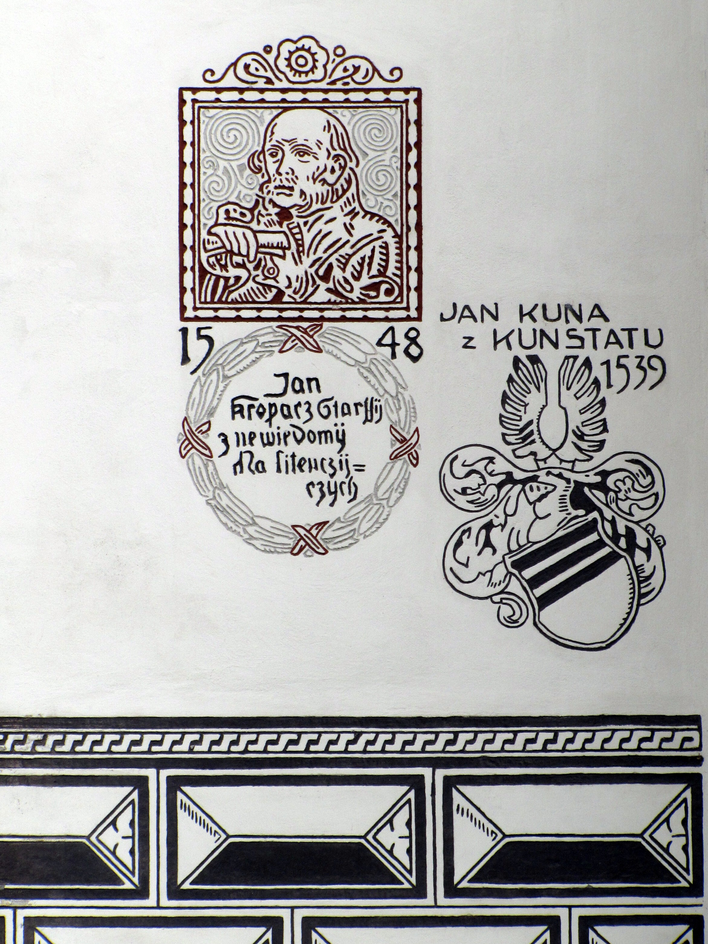 Sgrafita na zámečku v Kyjově (Nápis Jan Kuna z Kunštátu 1539, Jan Kropáč starší z Nevědomí na Litenčicích 1548)